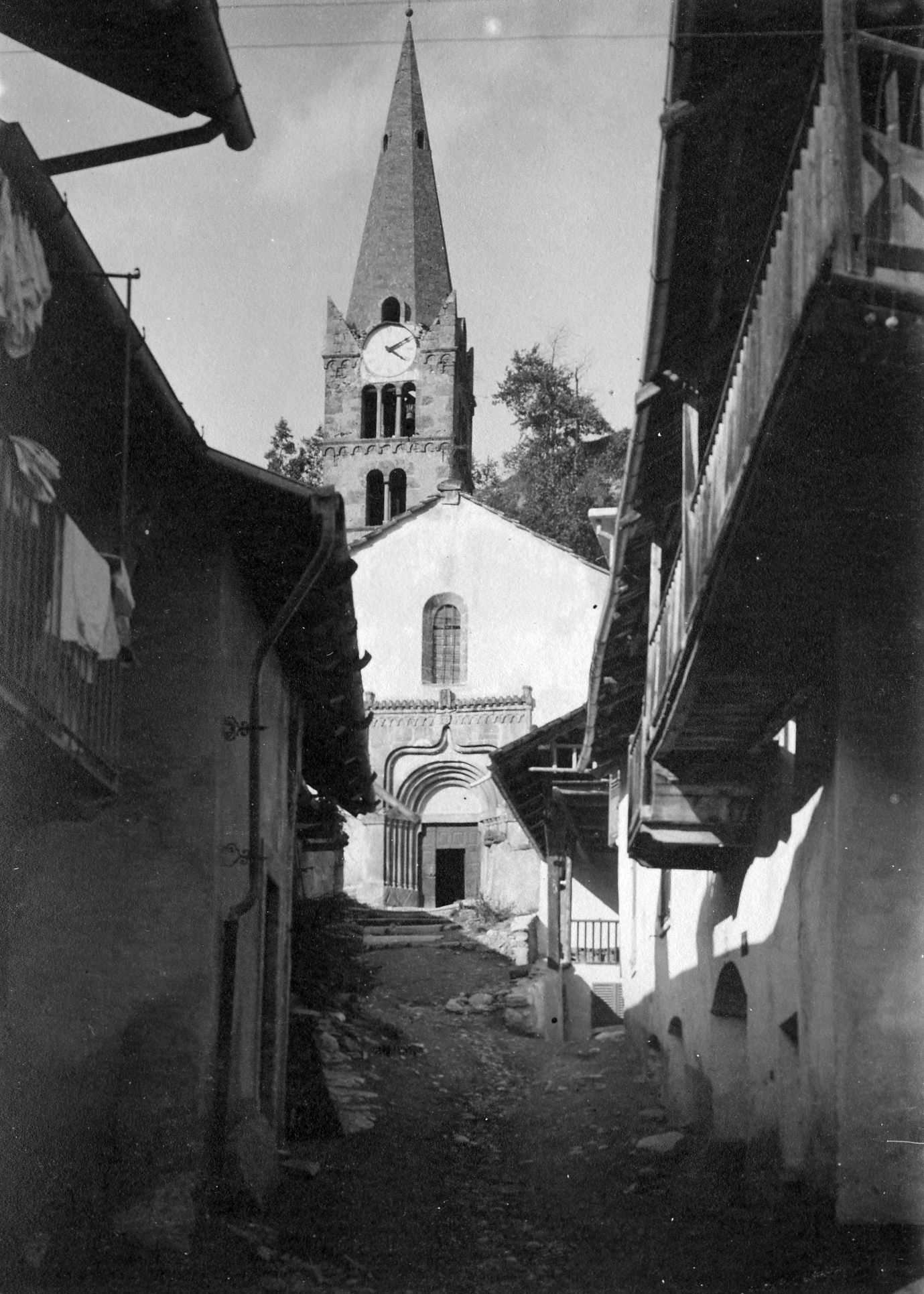 Cesana Torinese: chiesa di San Giovanni Battista fotografata nel 1912.